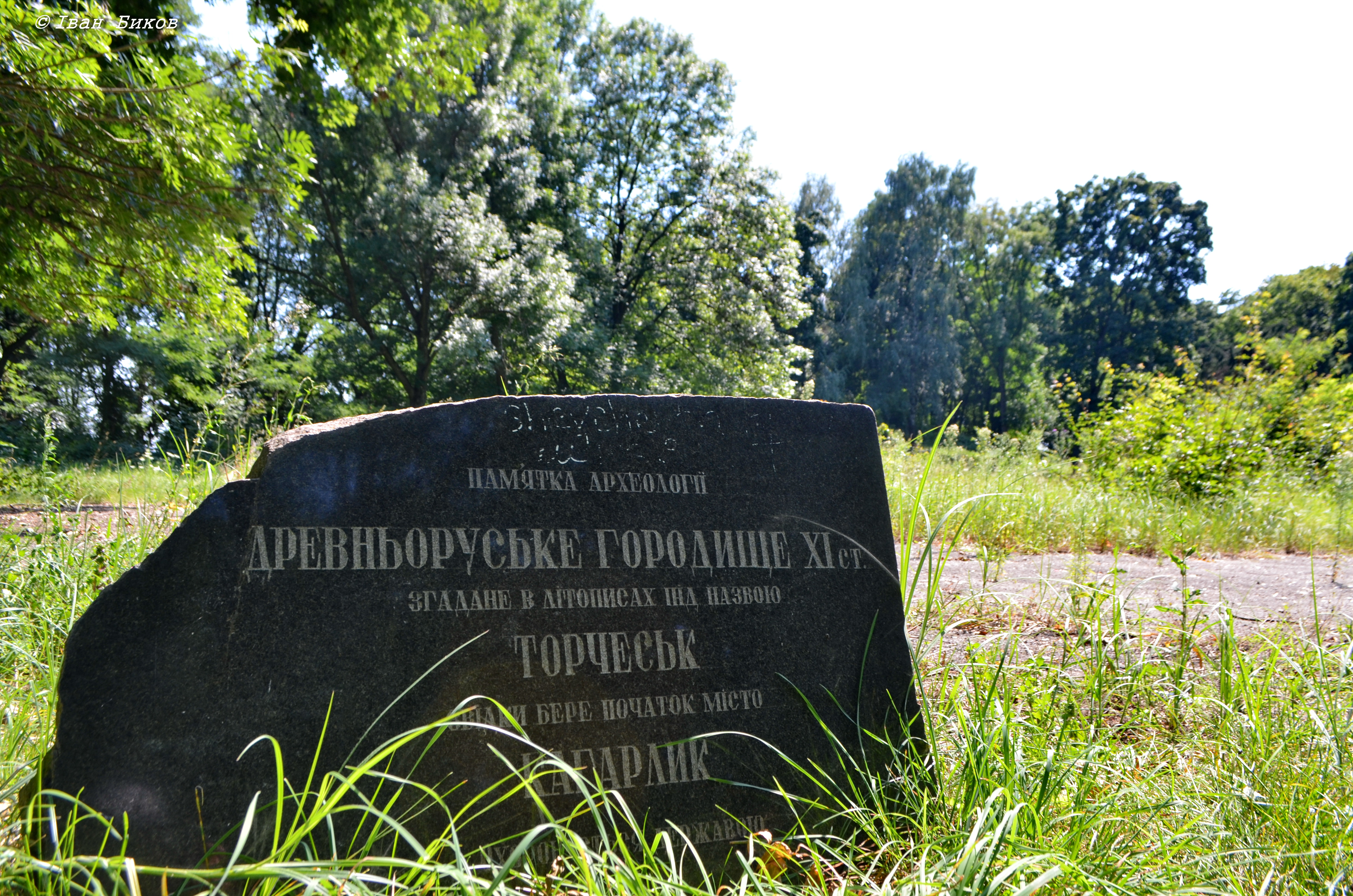 Парк-пам'ятка садово-паркового мистецтва загальнодержавного значення Кагарлицький, Кагарлик, вул. Воровського